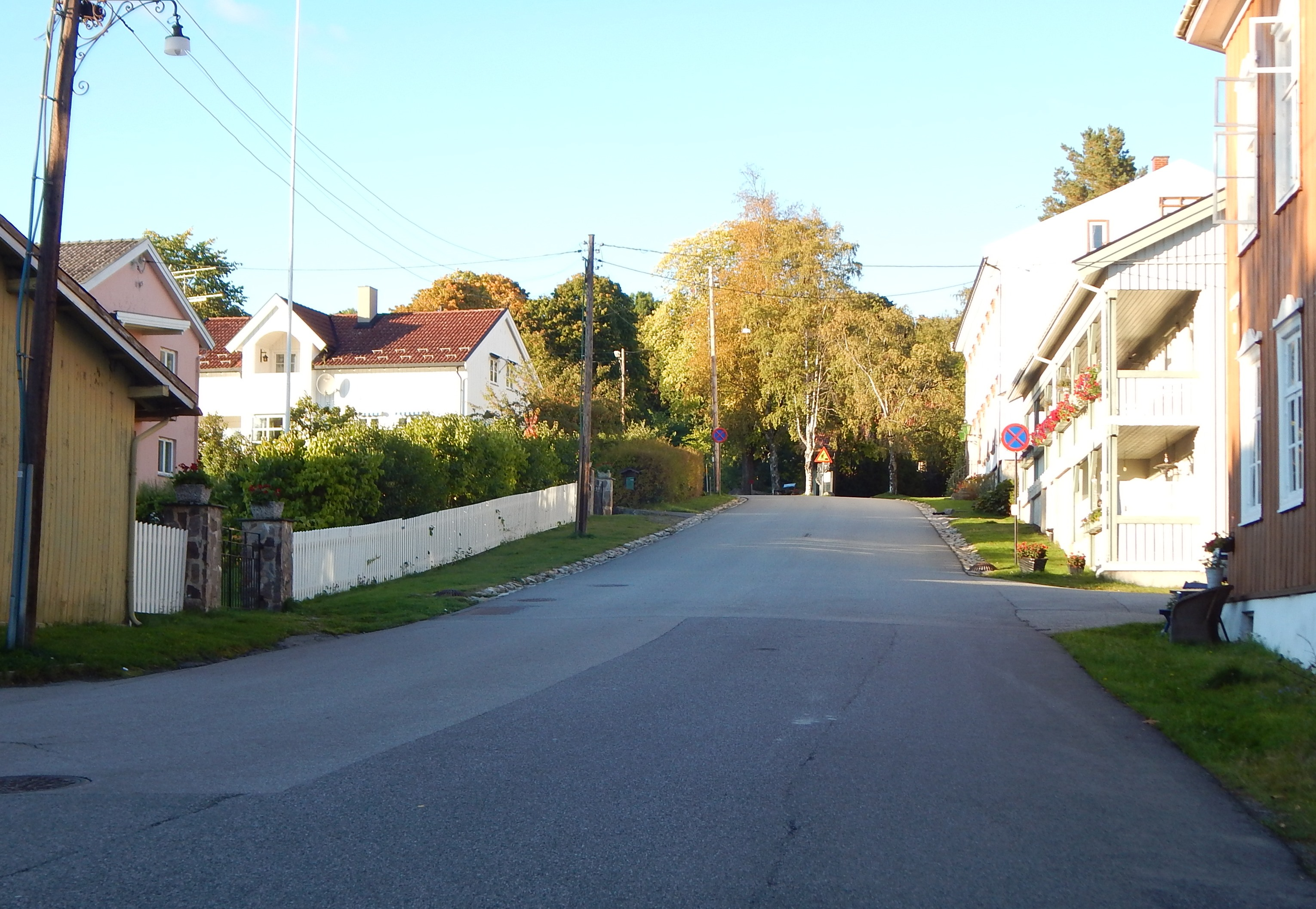 Jonas Lies gate (fylkesvei 388) i Kongsvinger by